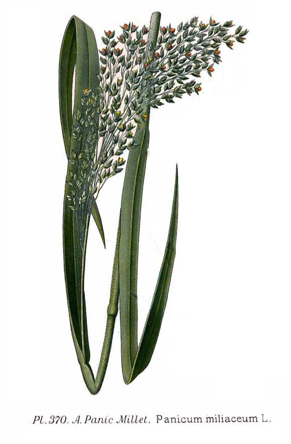 Panicum miliaceum L.